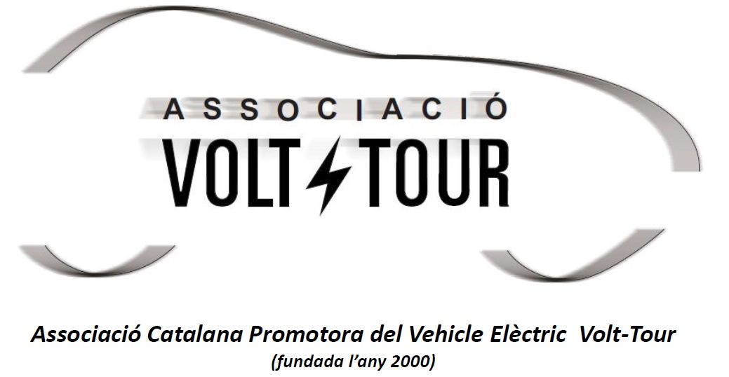 El logo de Volt-Tour és un vehicle amb un llamp en el seu interior per simbolitzar el vehicle elèctric.